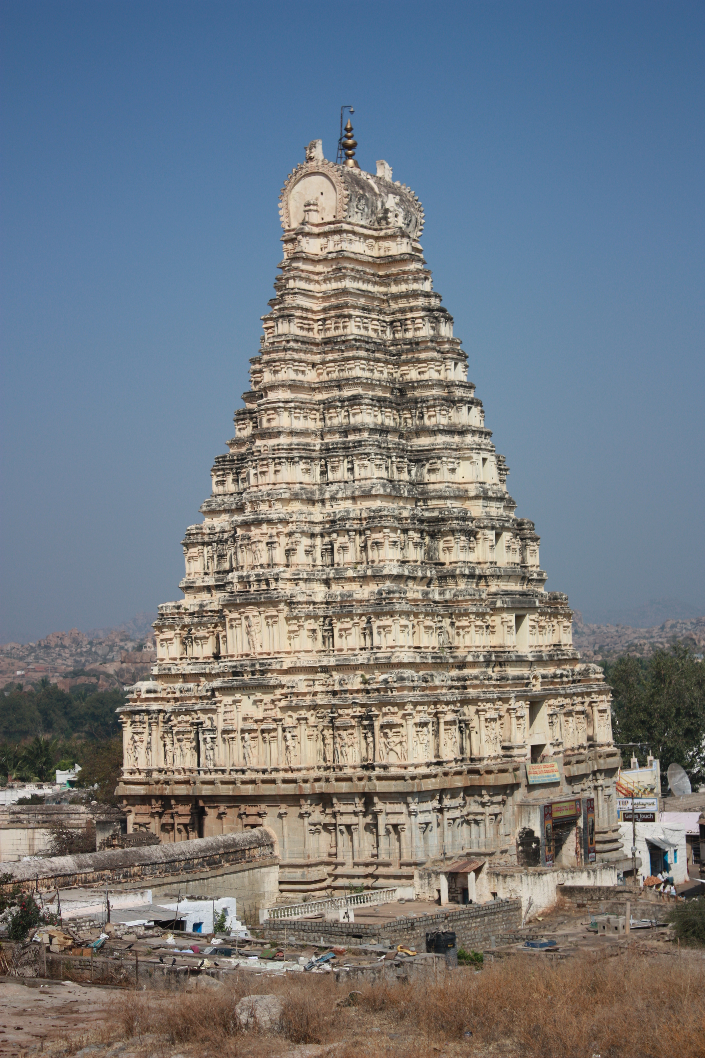 Hampi, Virupaksha Temple